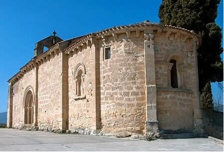 ERMITA DE LA ERAS, ROMÁNICA Siglo XII